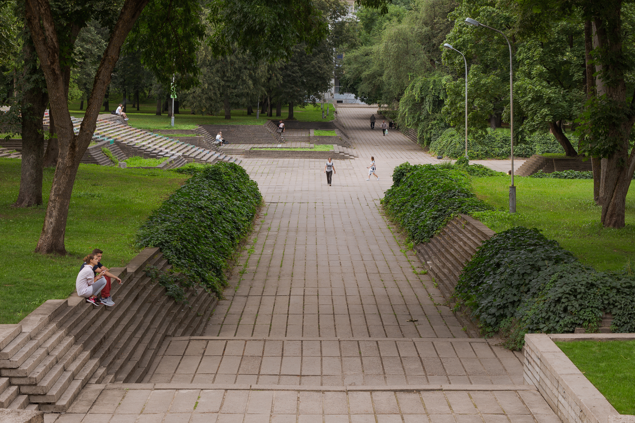 Reformatų Skveras vasarą. Rakursas ateinant nuo J.Basanavičiaus gatvės / LR Kultūros ministerijos.